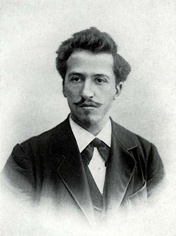 Anoniem. Piet Mondriaan. nl:1899. Den Haag, Gemeentemuseum Den Haag.